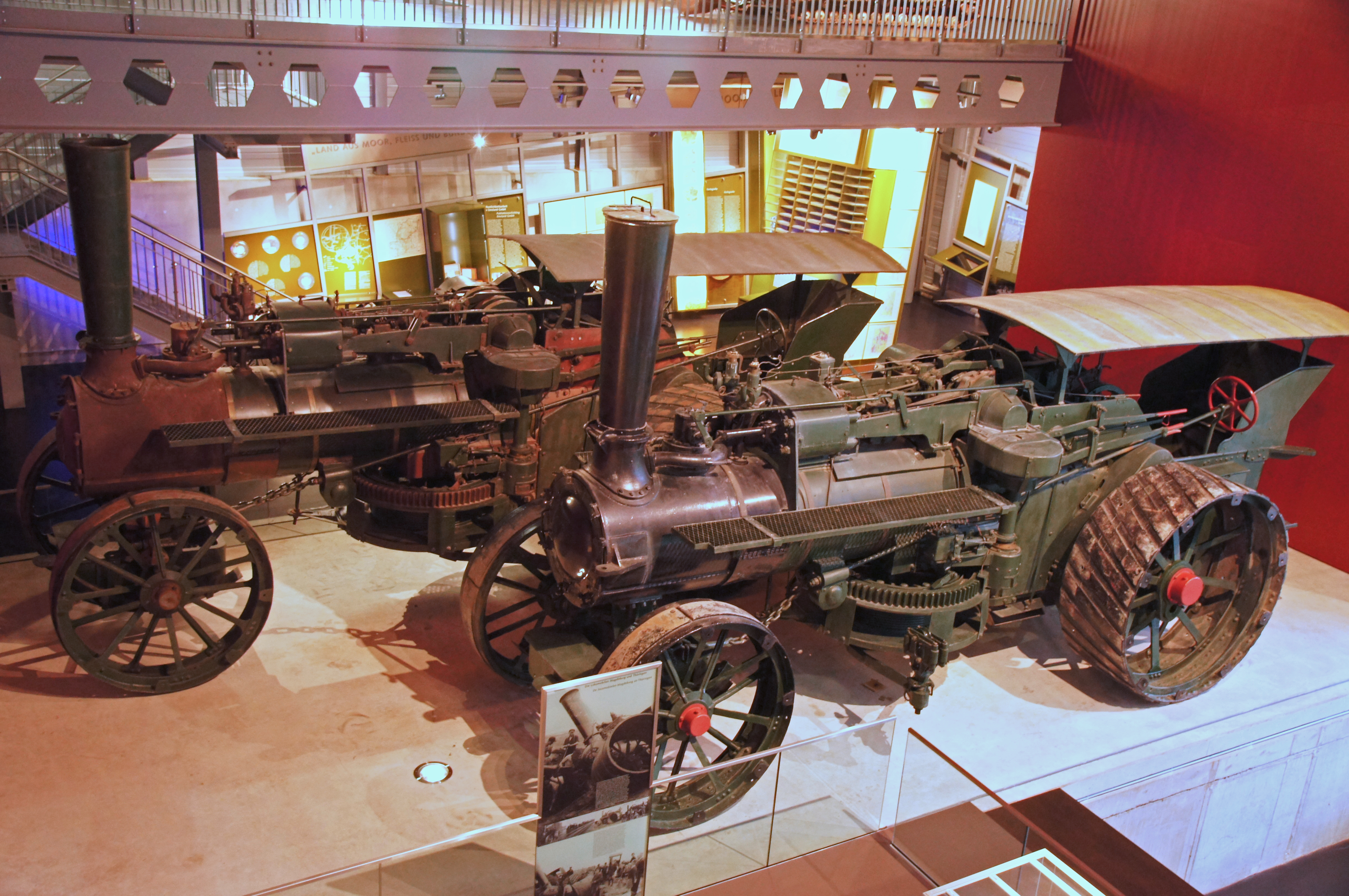 2010-10-30 Geeste, Moormuseum 035. Das Dampflokomotivenpaar Thüringen, Zugmaschinen eines Mammutpflugs der Firma Wilhelm Ottomeyer, Pyrmont, Deutschland. Hersteller Maschinenfabrik Fowler, England, umgebaut durch Firma Ottomeyer. Ursprüngliche Leistung ca. 240 PS, nach Umbau 480 PSn. Herstellungsjahr 1914, Außerdienststellung 1971. Quelle